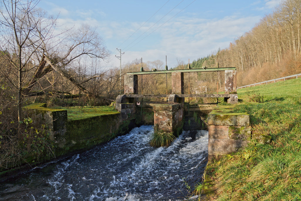 Wehr an der Lauter, westlich der Gemeinde Niederschlettenbach (Pfalz)